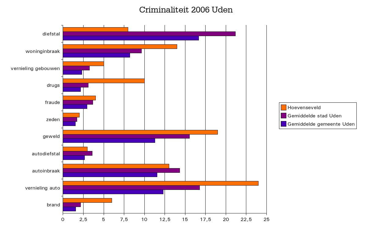 Criminaliteitcijfers in Uden Hoevenseveld (2006), Noord-Brabant, The Netherlands